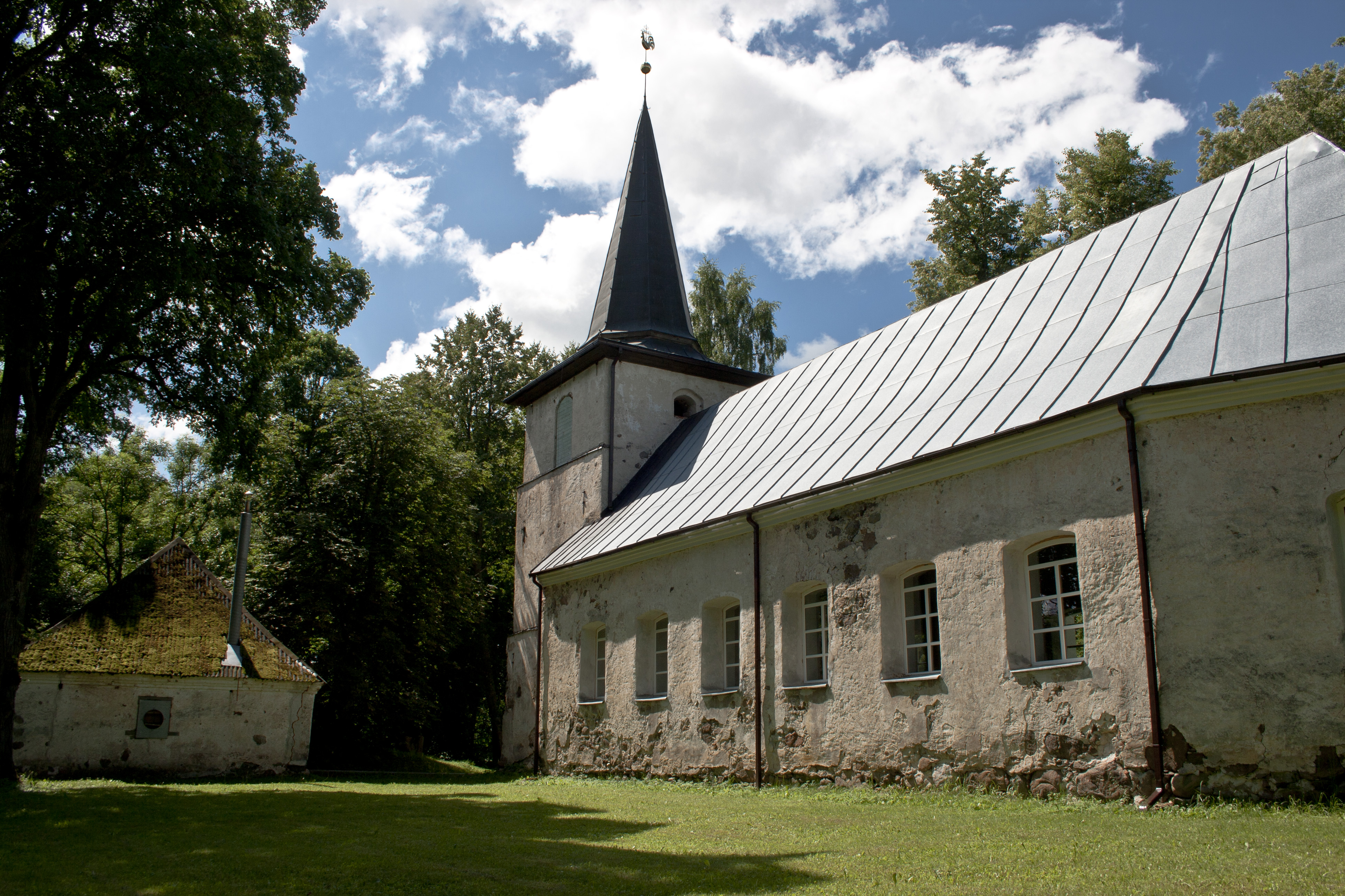 Annenieki Evangelic Lutheran Church